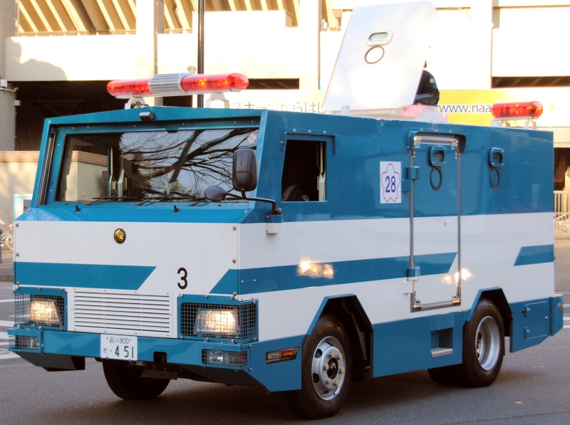 警視庁の特型警備車。